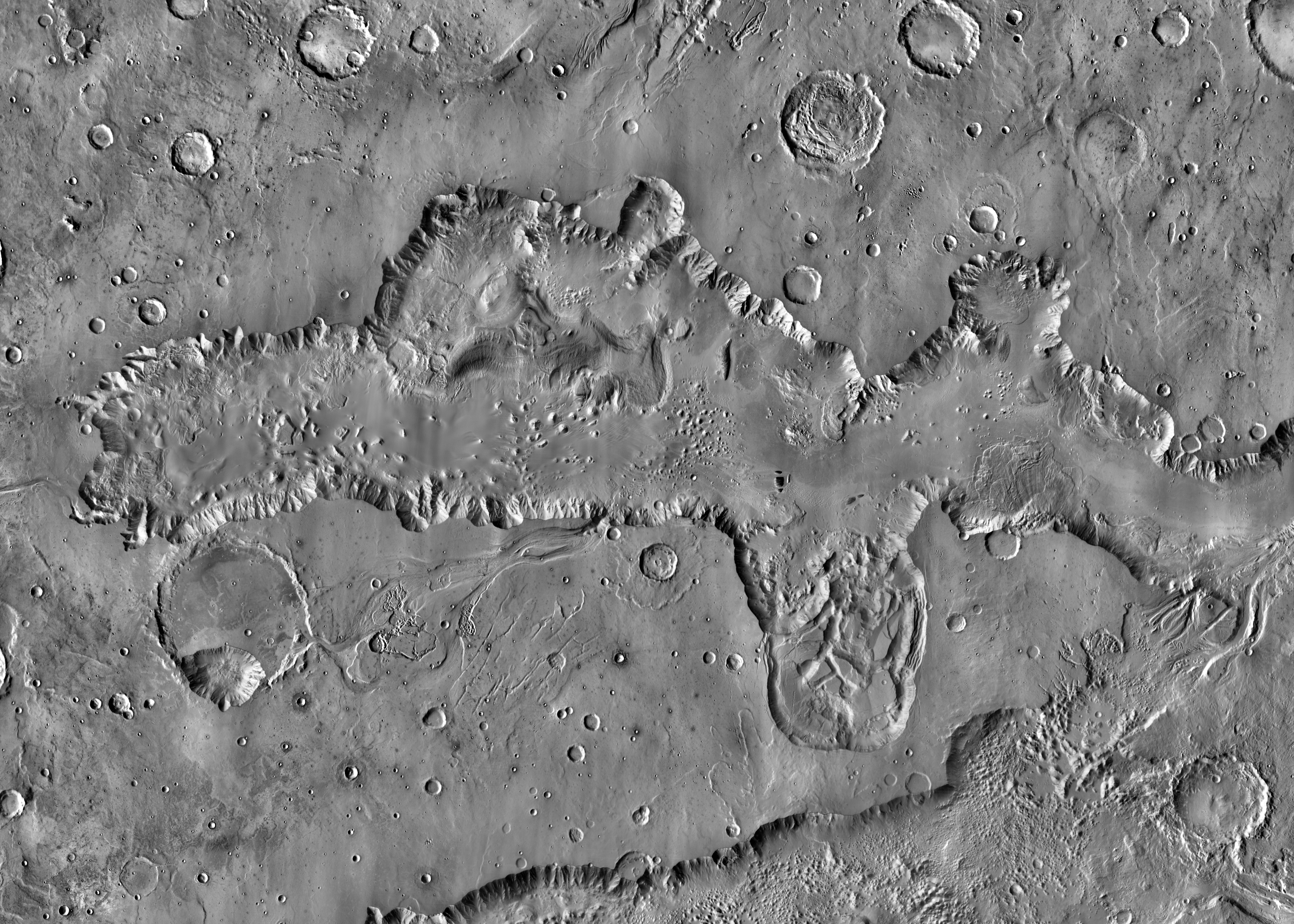 Ganges Chasma (Themis Day). Valles Marineris (Marte).